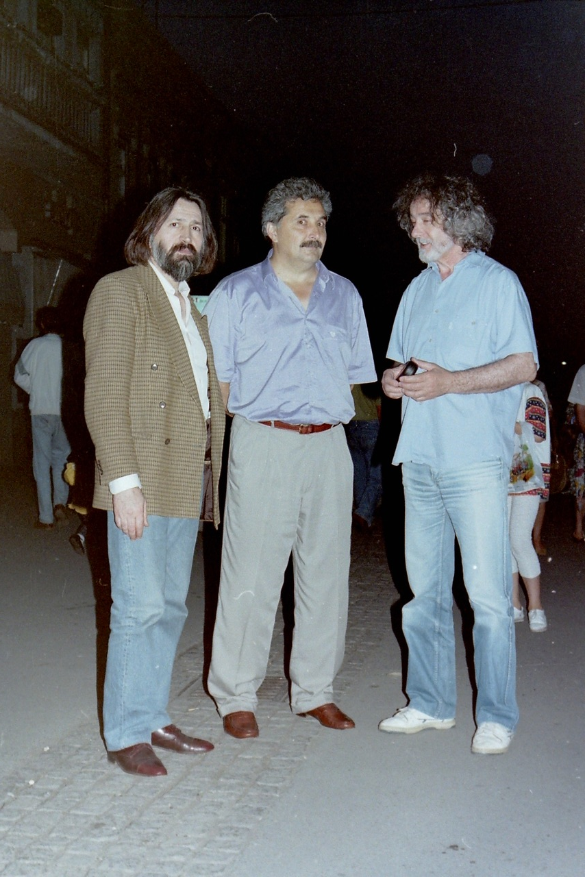 Змајеве игре у Новом Саду 1995, Миодраг Драганић са Јованом Зивлаком и Добрицом Ерићем.